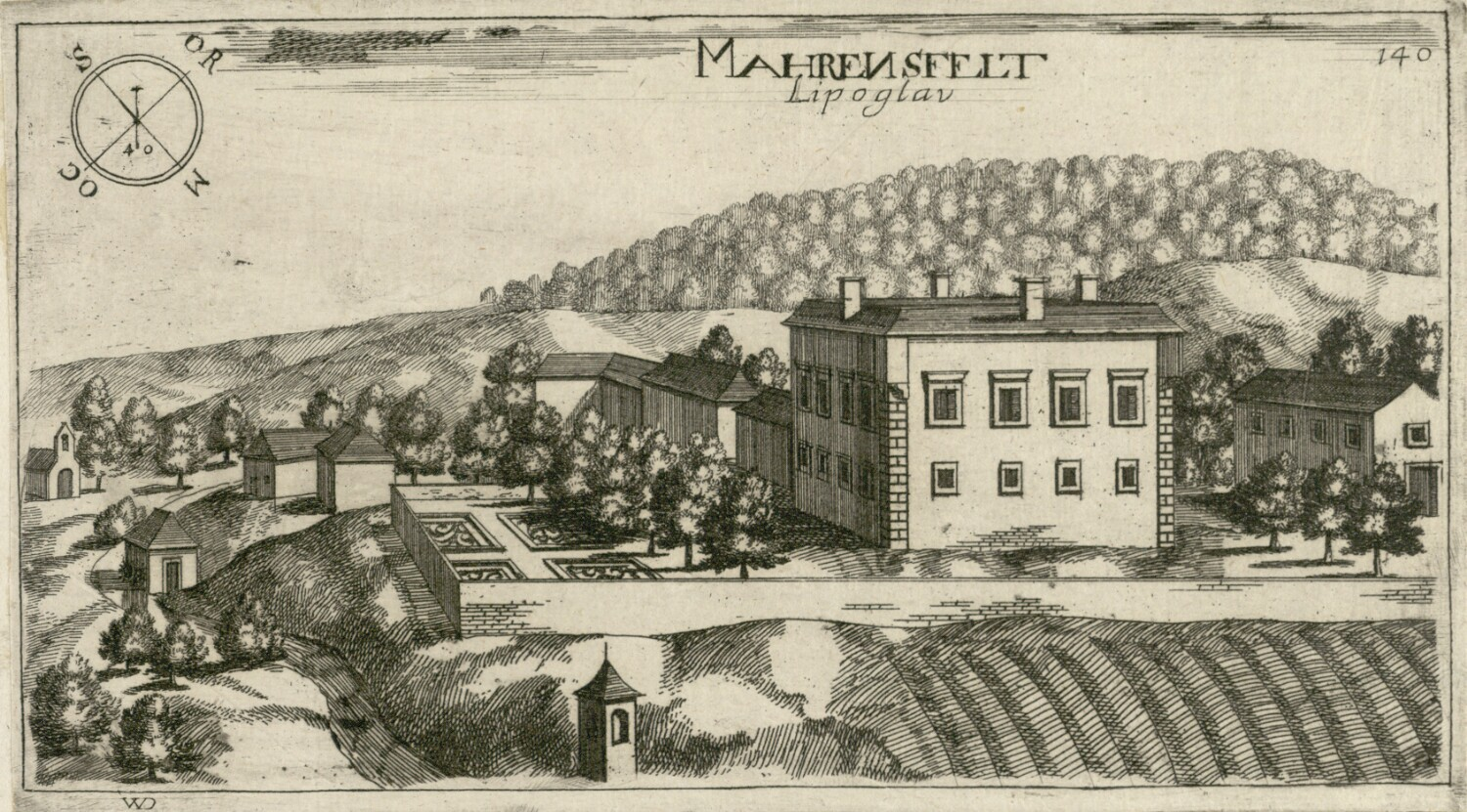 Dvorec Odolina